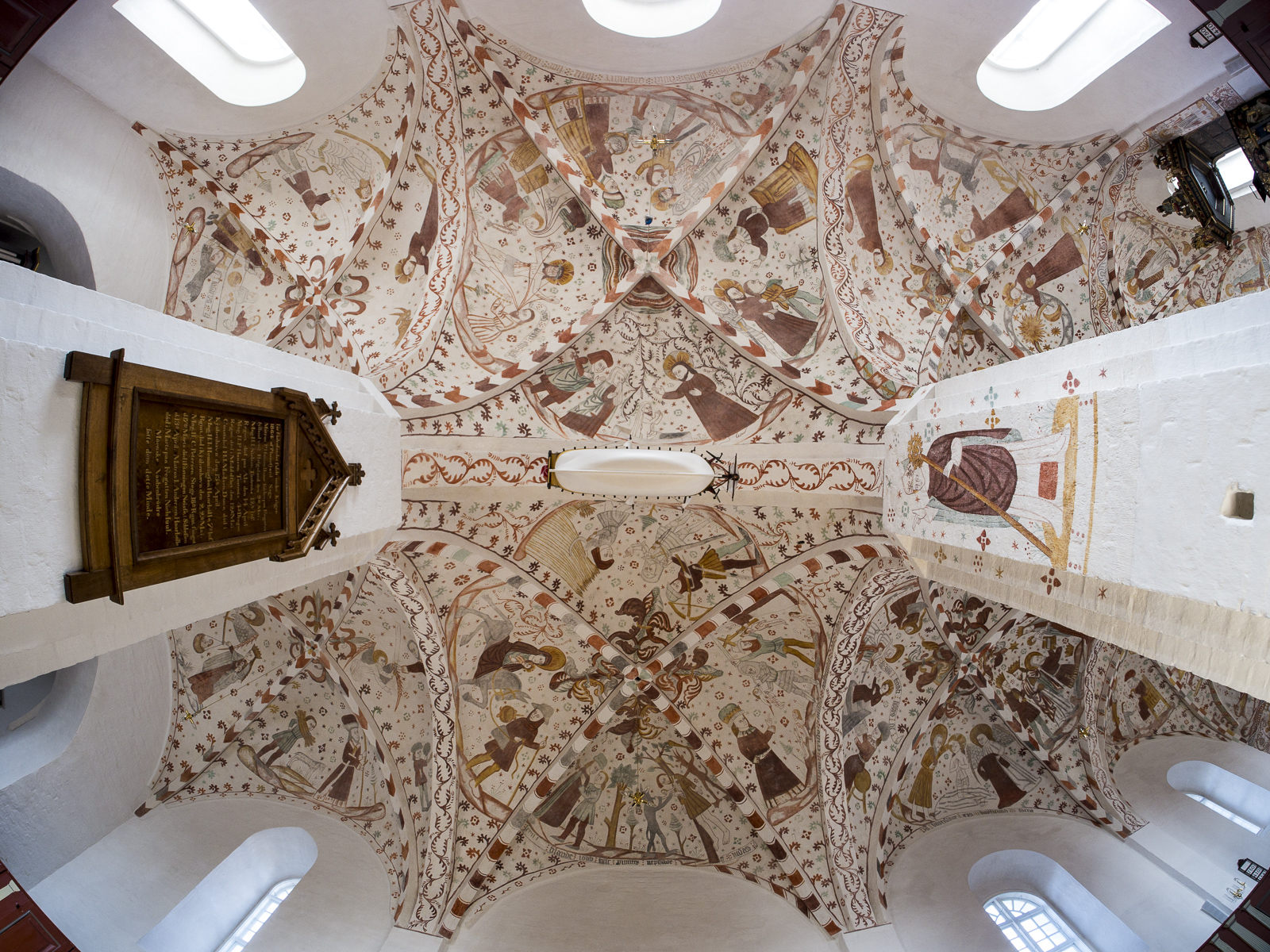 Fanefjord Kirke